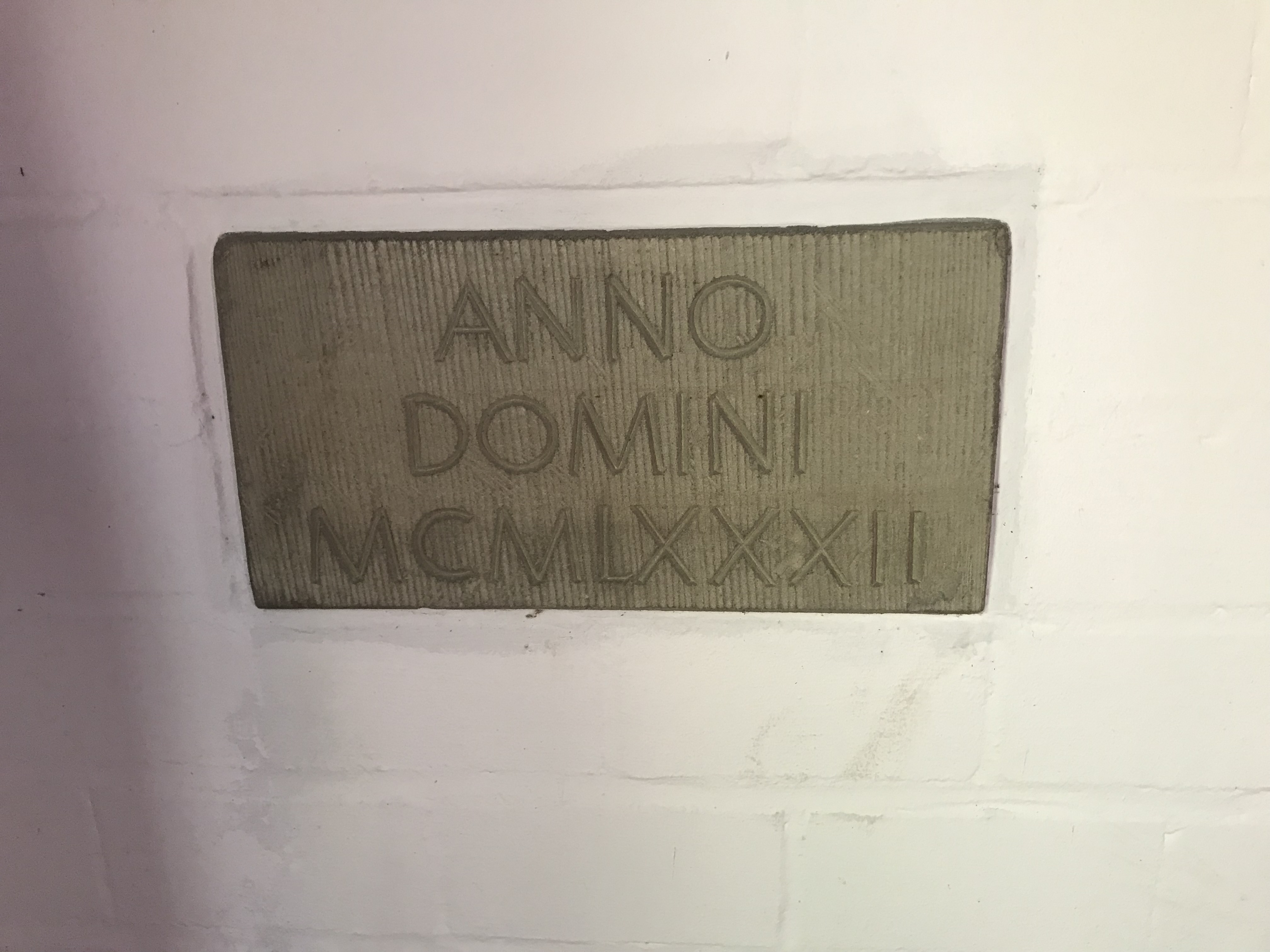 Peterbergkapelle Grundstein. Gelegt mit Insignien am 5. September 1982